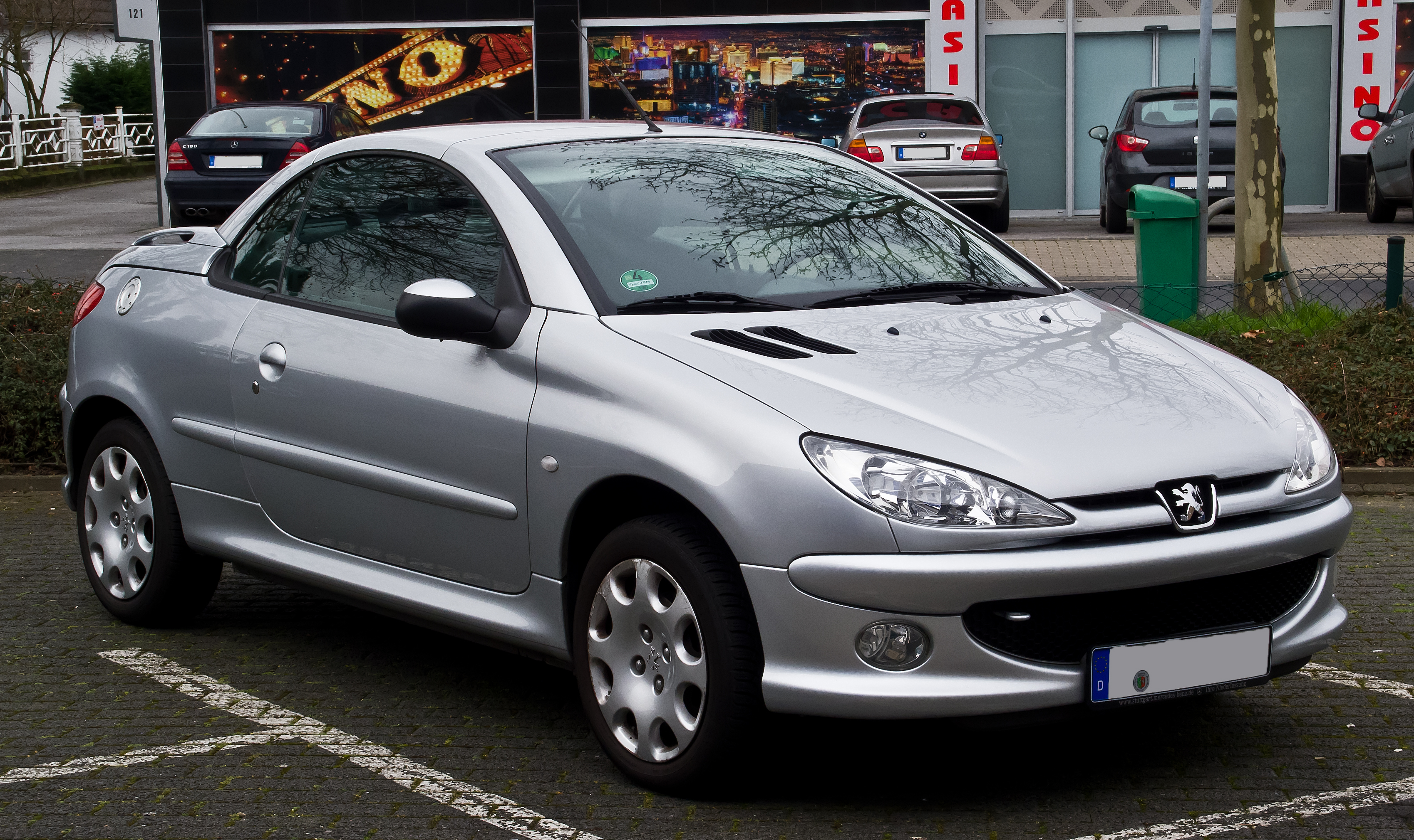 Peugeot 206 CC (Facelift)